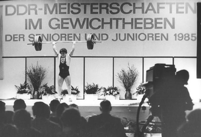 Dresden, DDR-Meisterschaften im Gewichtheben ADN-ZB Heikel 02.02.1985 Dresden: DDR-Meisterschaften im Gewichtheben. 54 Heber ermittelten am 1. und 2. Februar erstmals in Dresden ihre Meister Die 37. Titelkampfe sind als All-Kategorie-Meisterschaft ausgeschrieben.